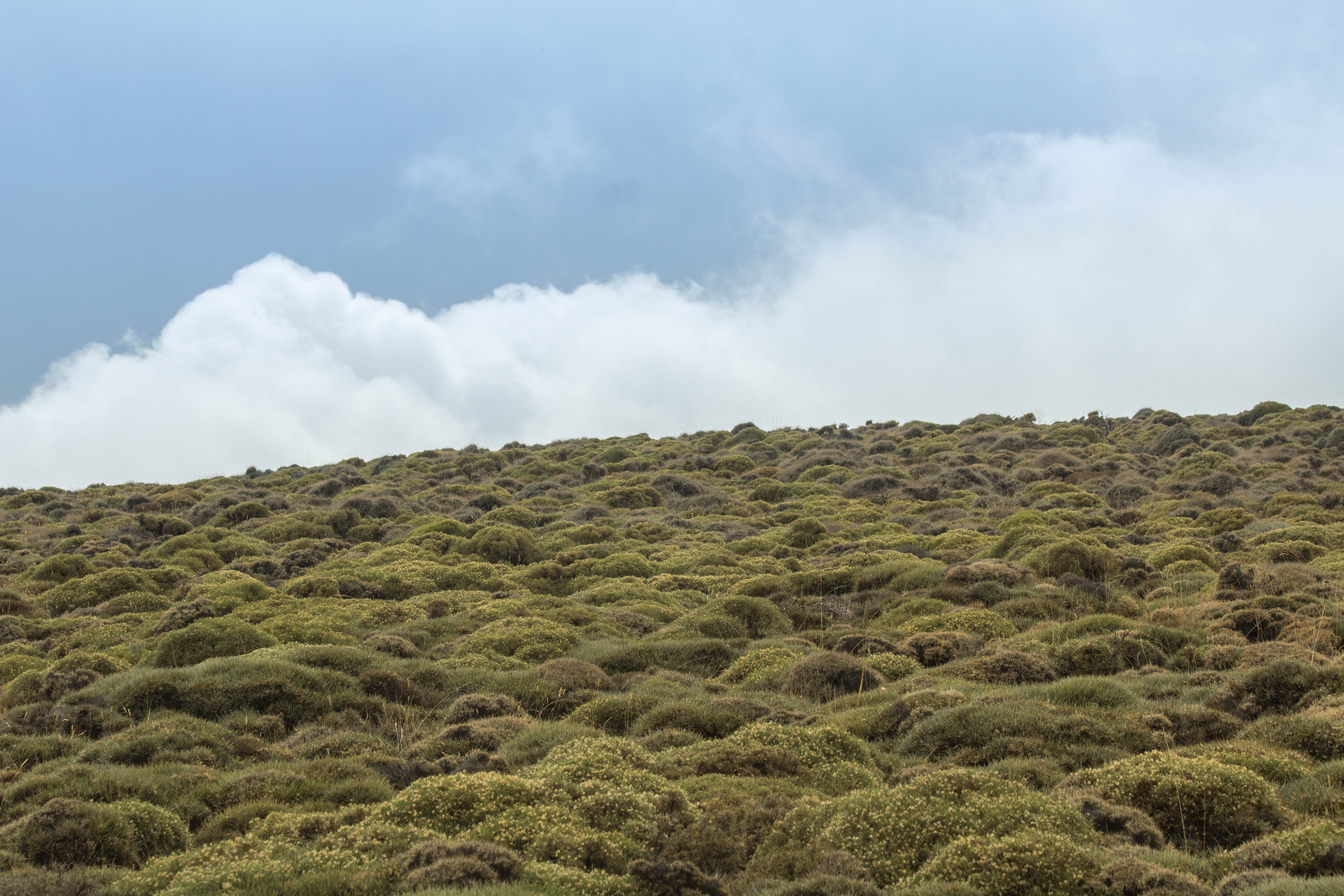 Paisaje de matorral almohadillado de la cumbre de Los Pelaos en Sierra de Lújar